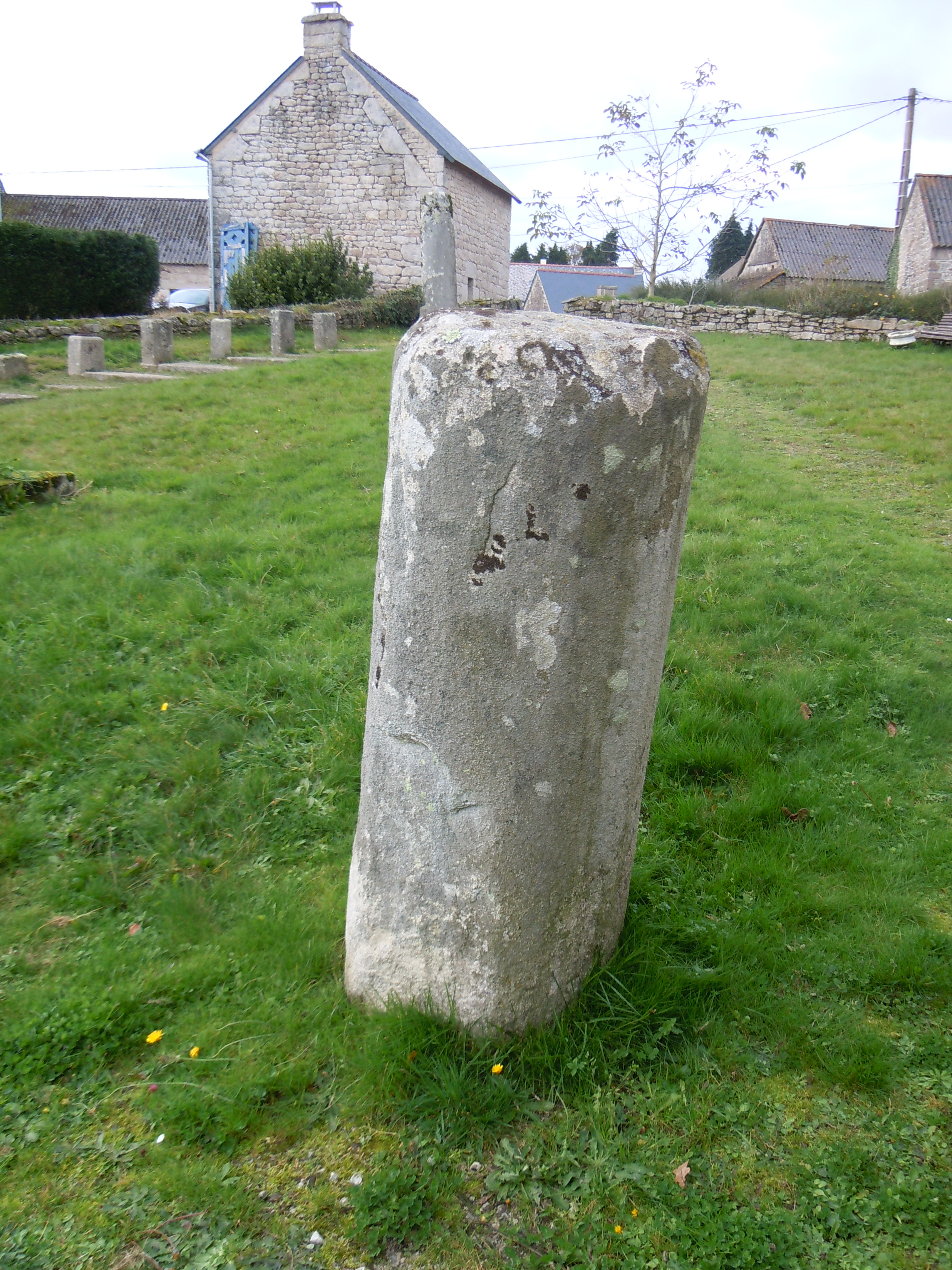 La seconde borne miliaire de Locmeltro, tronquée au sommet (commune de Guern dans le Morbihan)